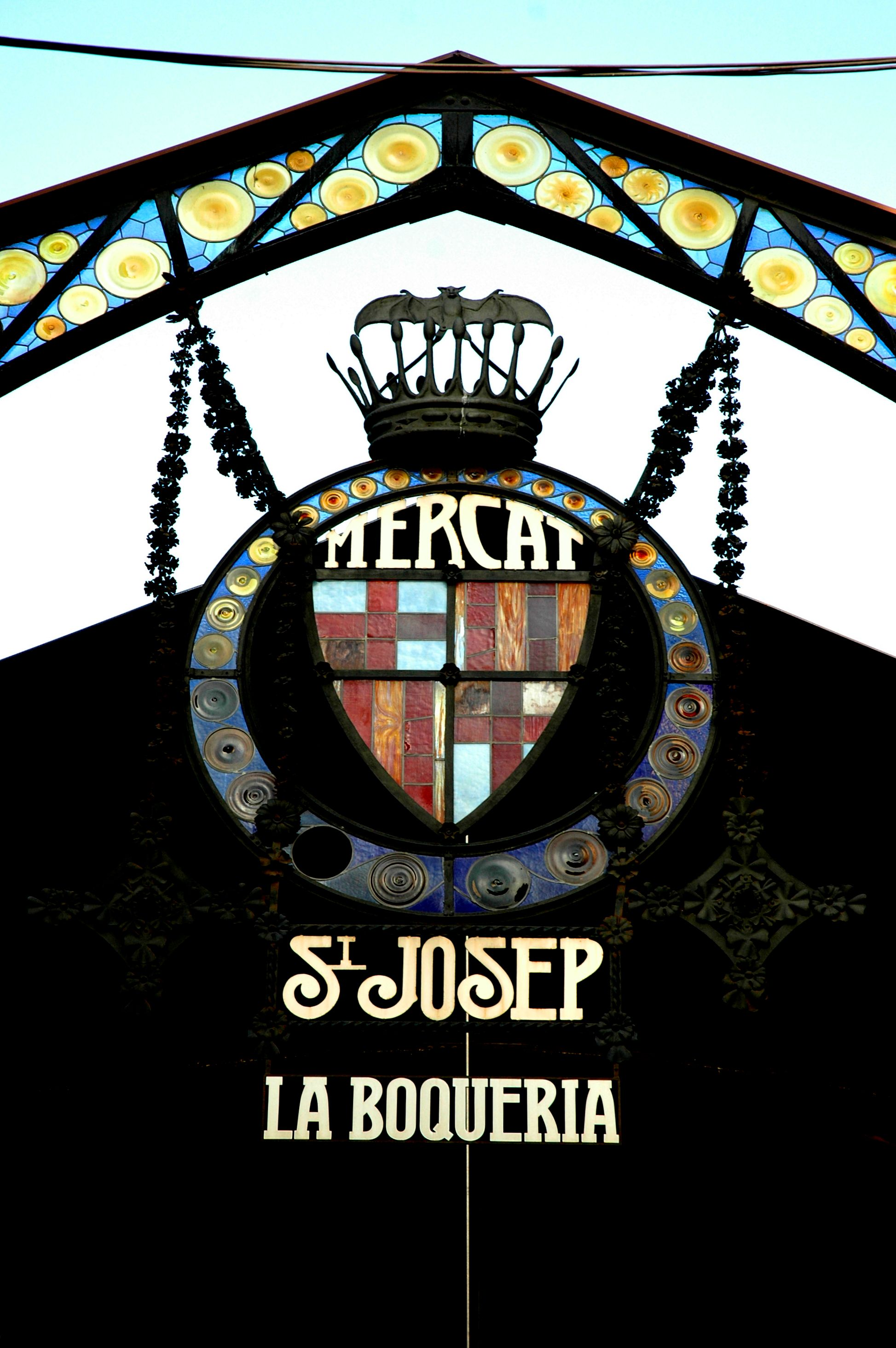 Boqueria - Escut